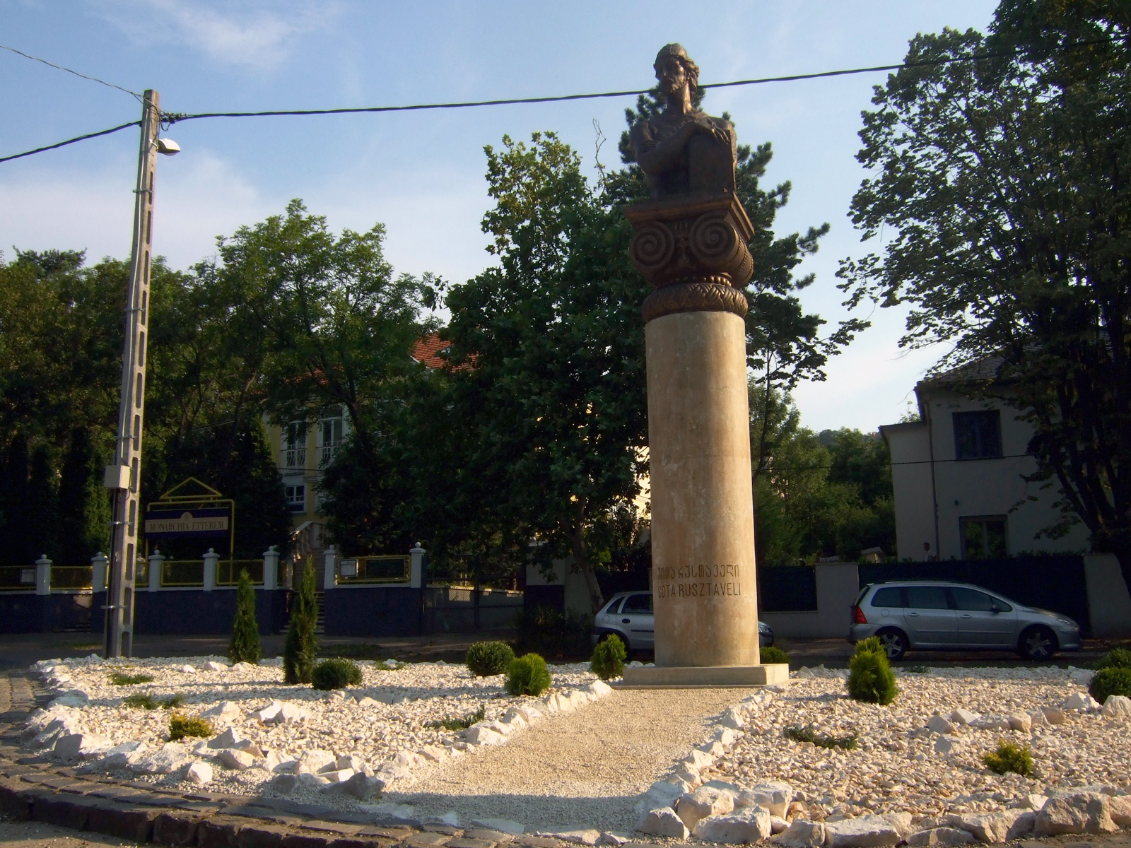 Sota Rusztaveli mellszobra Budapesten a Kútvölgyi út és a Virányos út kereszteződésében, XII.